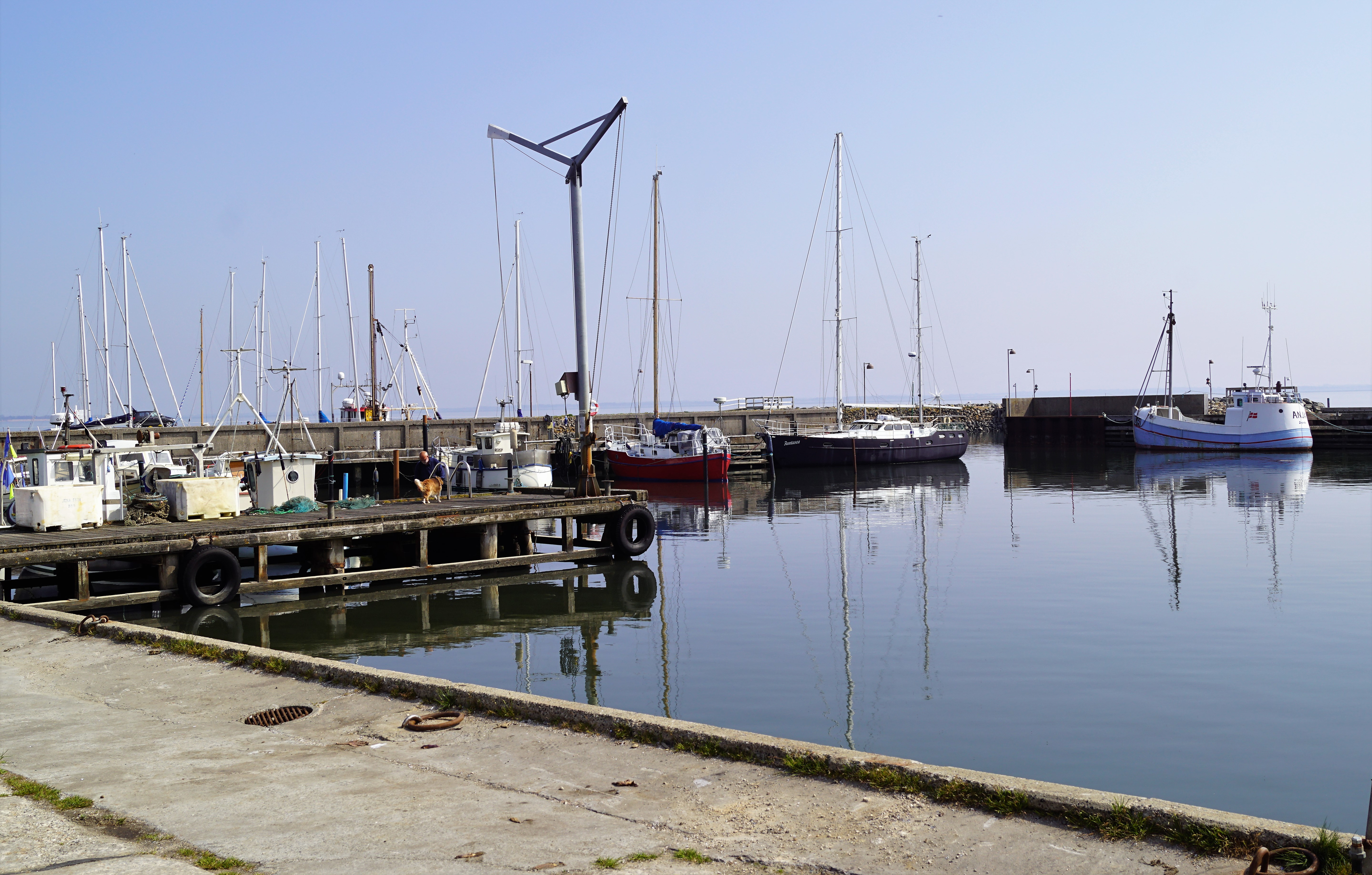 Jegindø Havn i Limfjorden